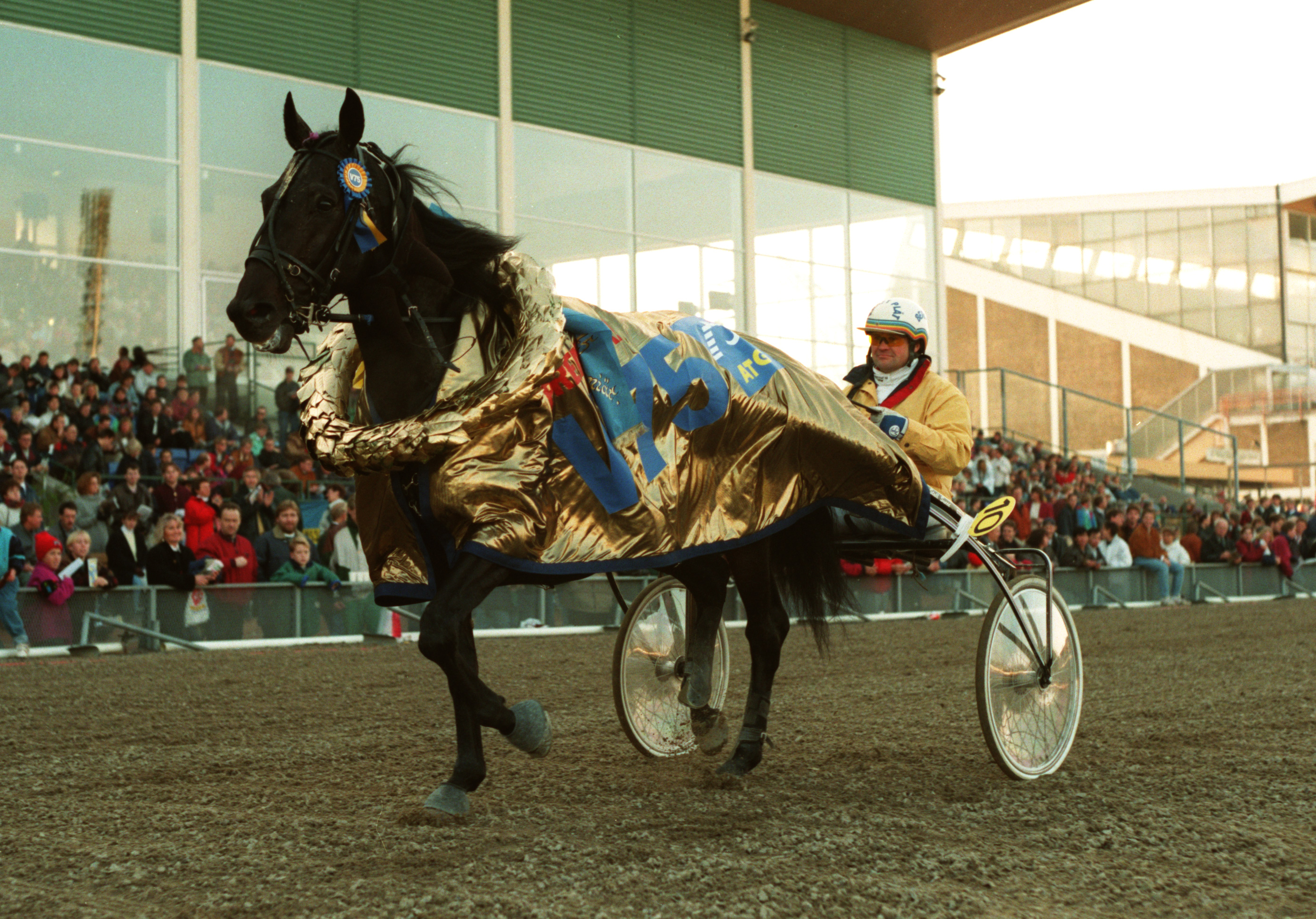 Erik Berglöf och Copiad segerdefilerar efter att ha vunnit premiärloppet av V75 på Jägersro den 30 oktober 1993.